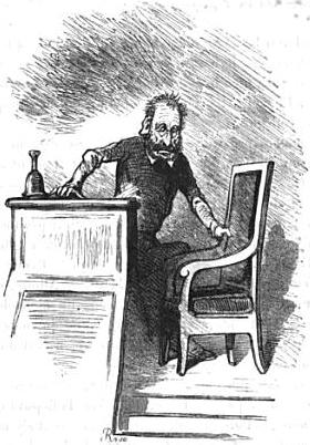 Caricature du doyen d'âge de la Constituante de 1848, Pierre-François Audry de Puyraveau, par Cham.